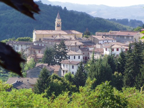 Panorama di Pecorara Capoluogo.